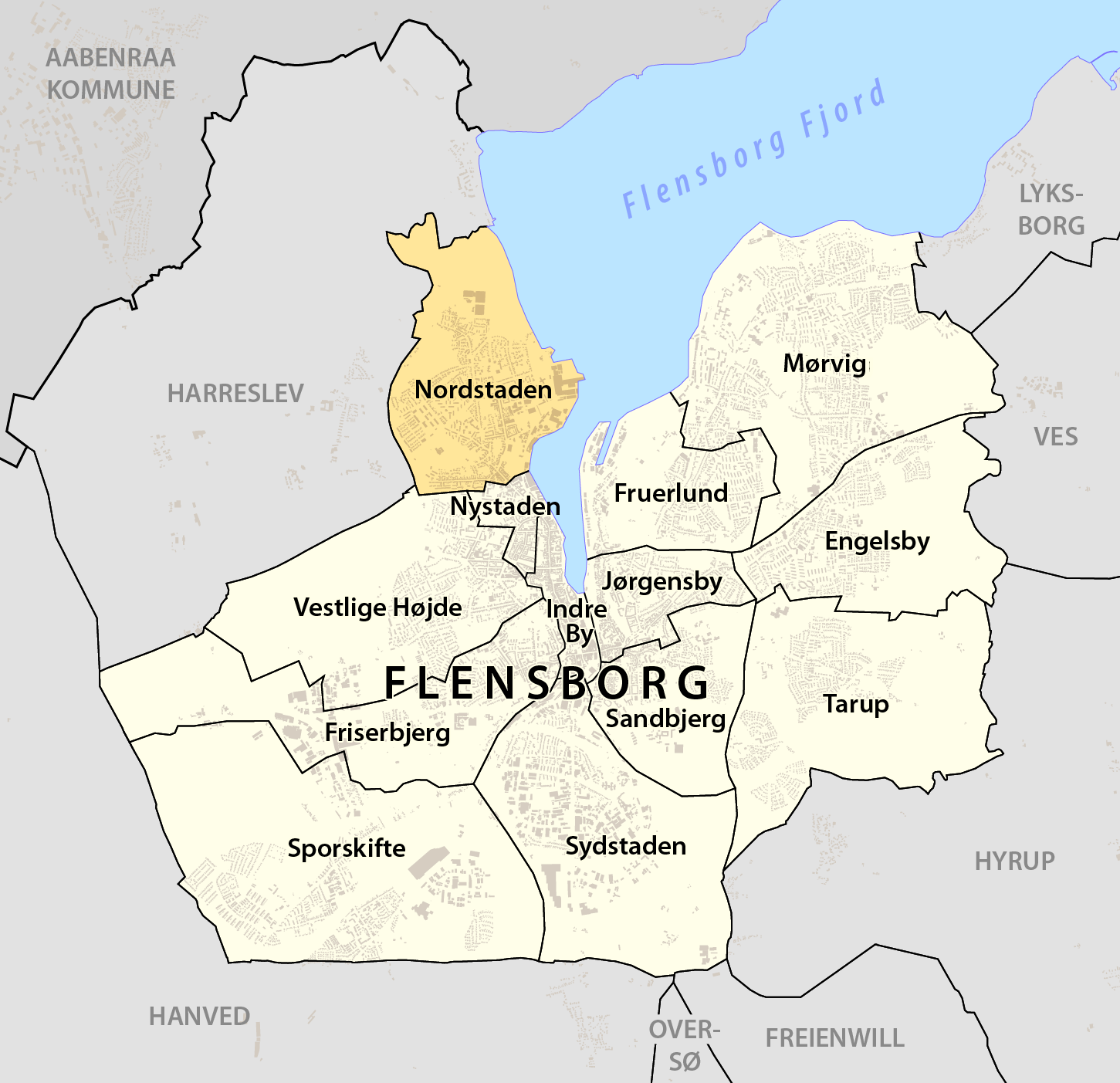 Beliggendhed af Nordstaden i Flensborg Kommune